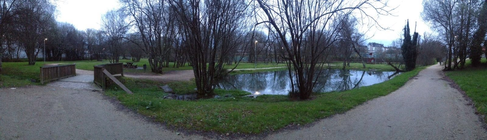 Foto do Paseo do Carboeiro